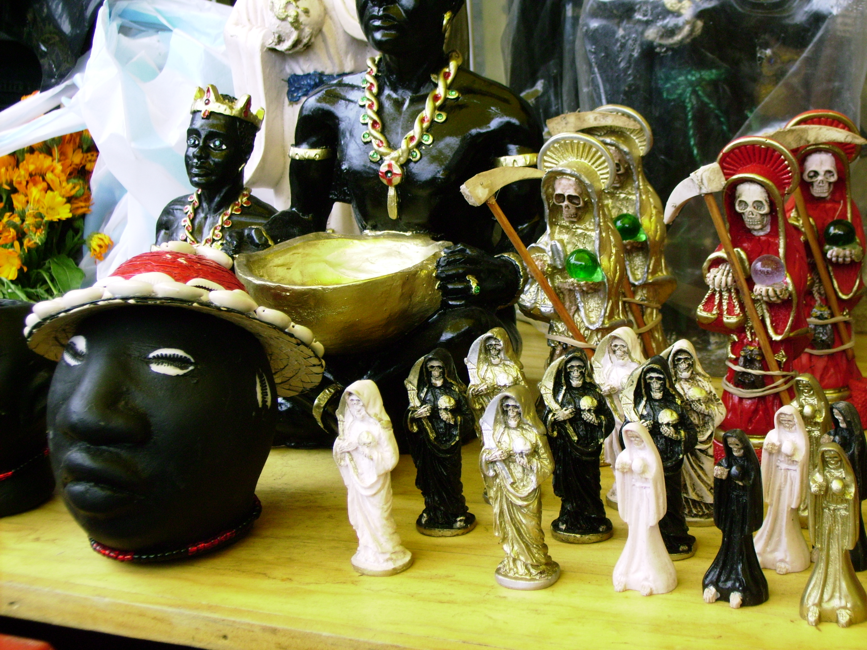 Santa Muerte (Mercado de Sonora, Mexico City)